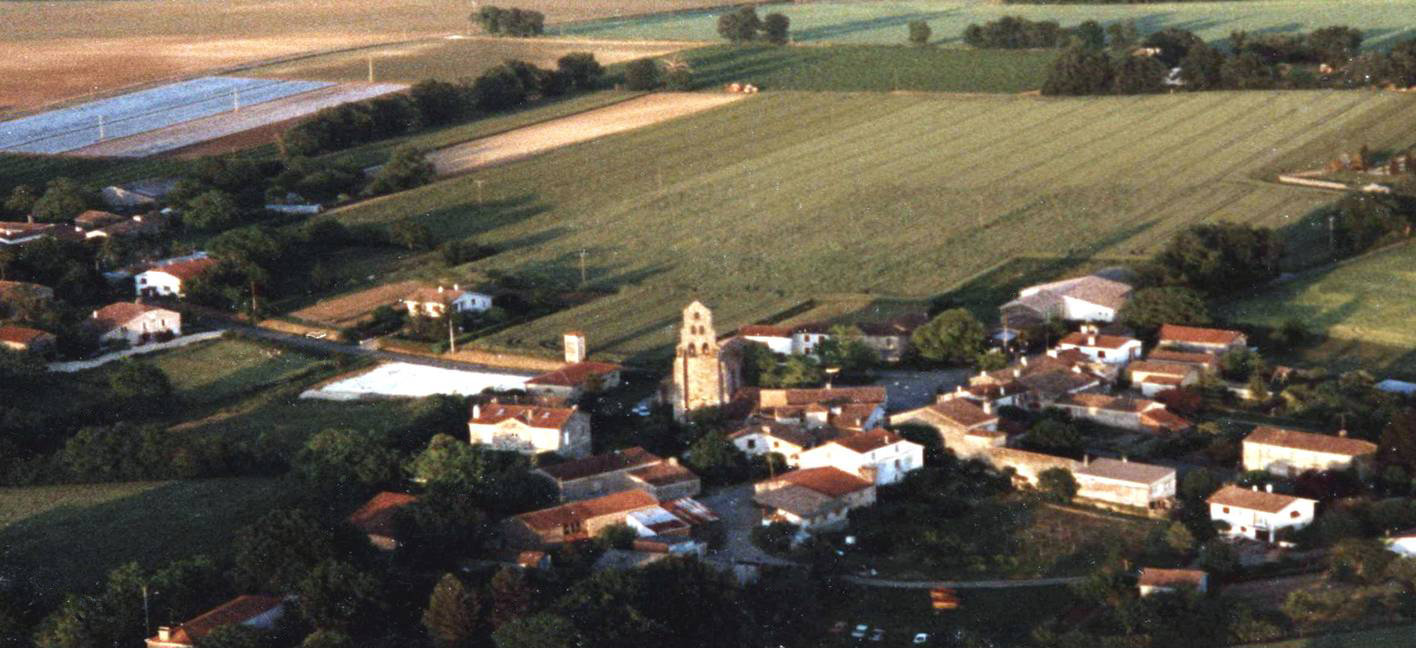 Village de Lannes vu depuis un ULM